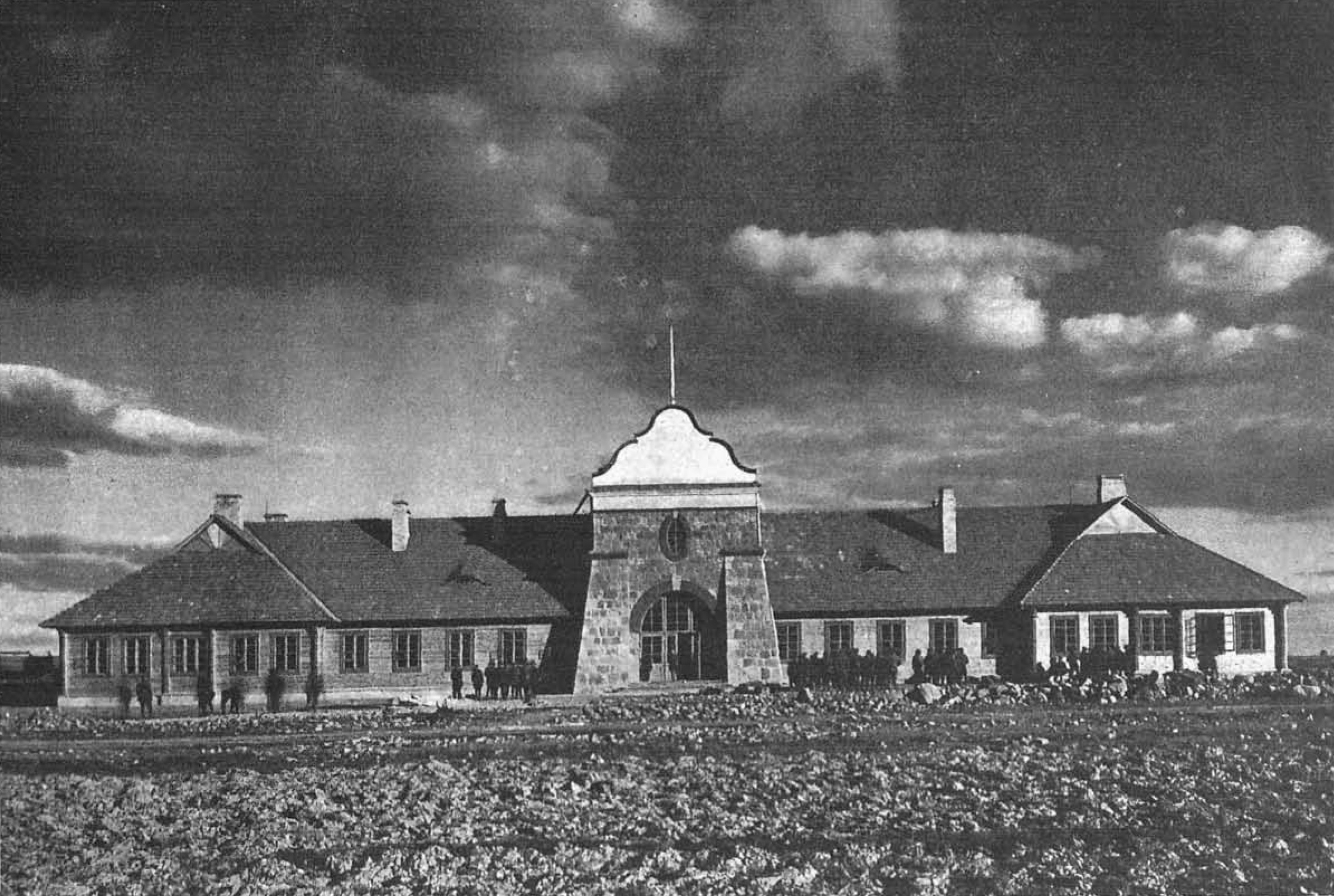 Беларуская (тарашкевіца): Клецак (Klecak), вуліца Кашарская (vulica Kašarskaja). Кашары